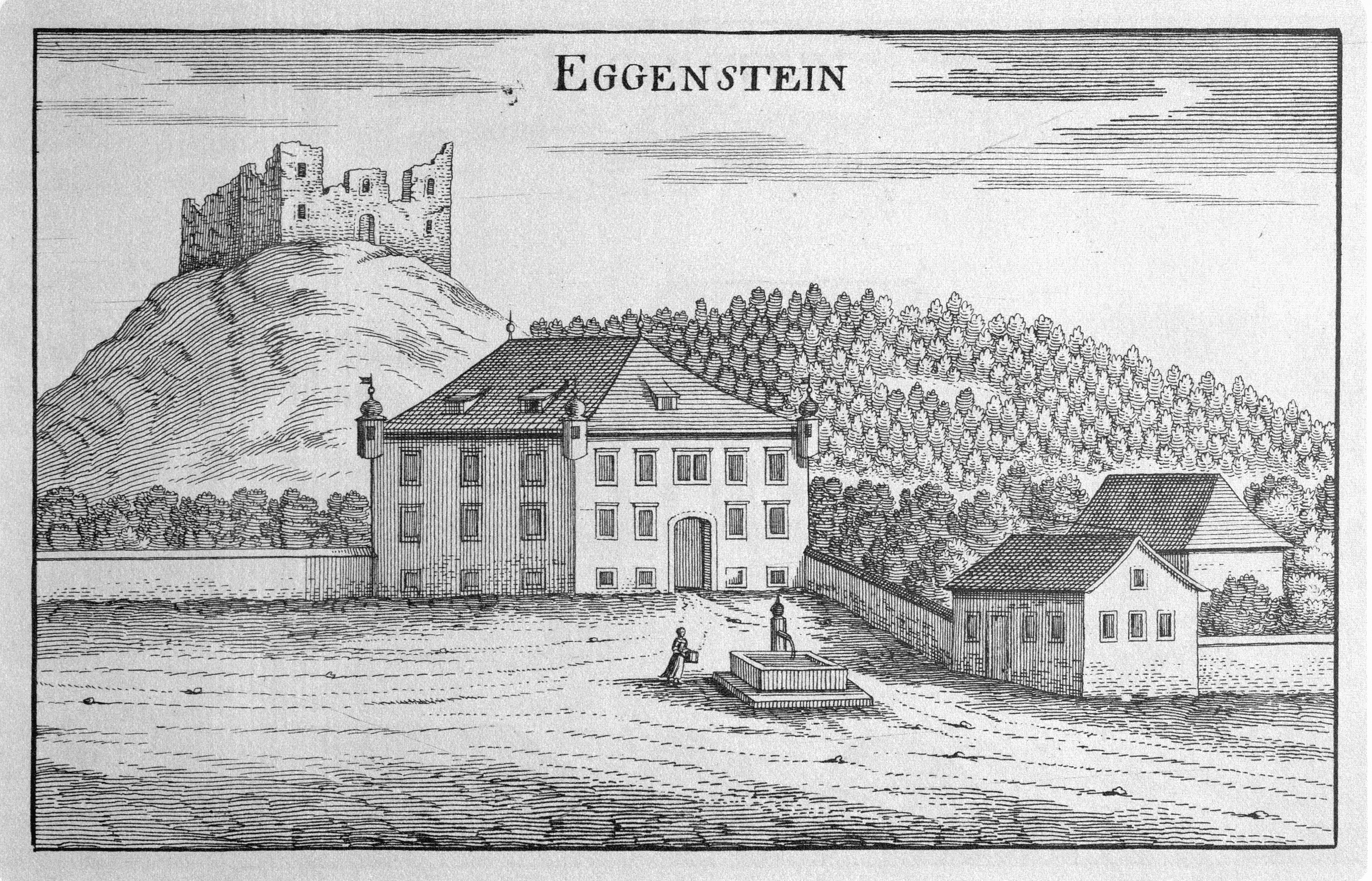 G. M. Vischers Käyserlichen Geographi, Topographia Ducatus Stiriae, Das ist: Eigentliche Delineation / und Abbildung aller Städte / Schlösser / Marcktfleck / Lustgärten / Probsteyen / Stiffter / Clöster und Kirchen / so es sich im Herzogthumb Steyrmarck befinden; Und anjetzo Umb einen billichen Preyß zu finden seynd Bey Johann Bitsch Universitäts Buchhandlern / Auff dem Juden=Platz bey der guldenen Saulen. Graz 1681 Die Nummerierung der Dateien folgt der alphabetischen Reihung der Orte